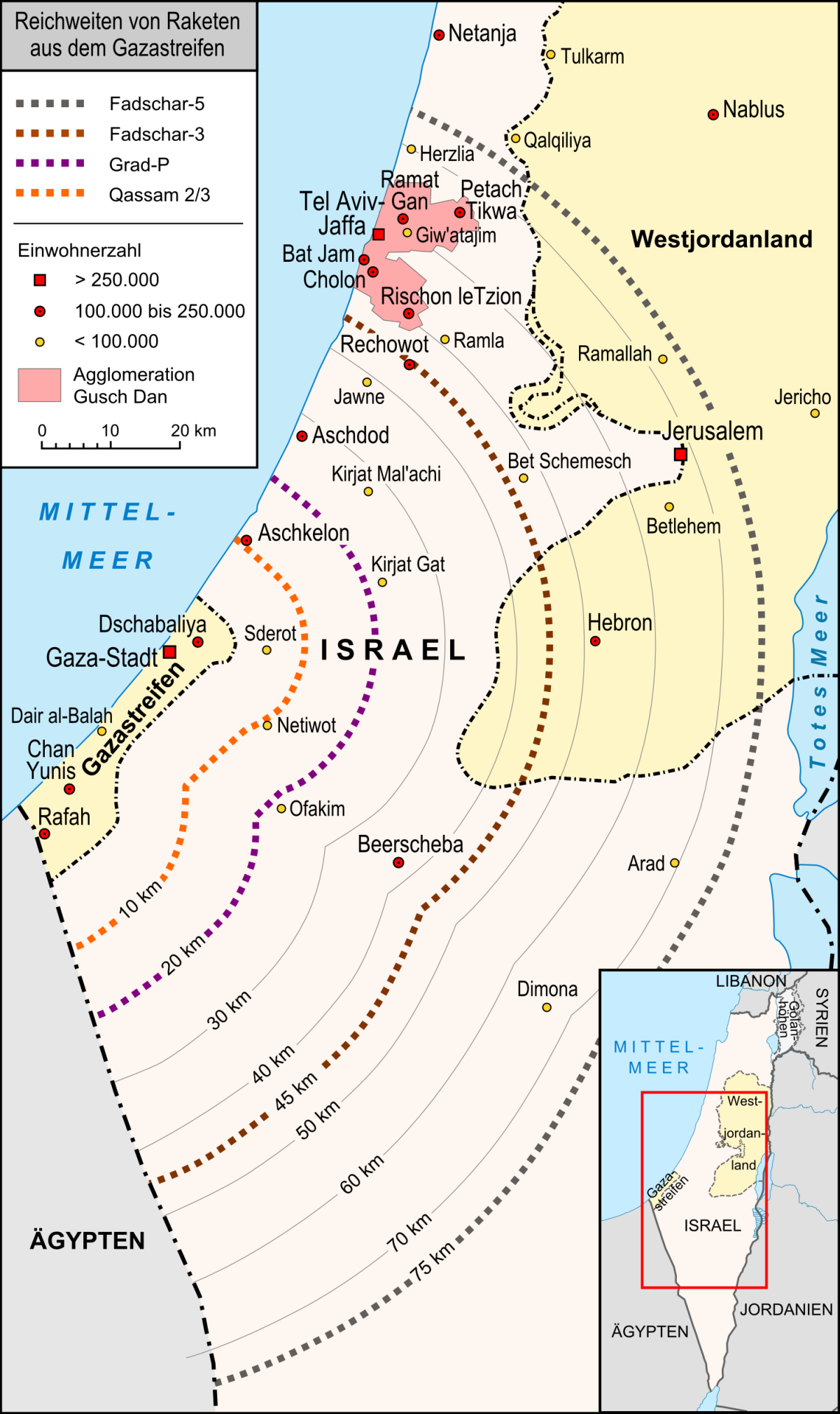 Maßstäbliche Karte der möglichen Reichweiten von Raketen, die aus dem Gazastreifen auf israelisches Gebiet abgefeuert werden.